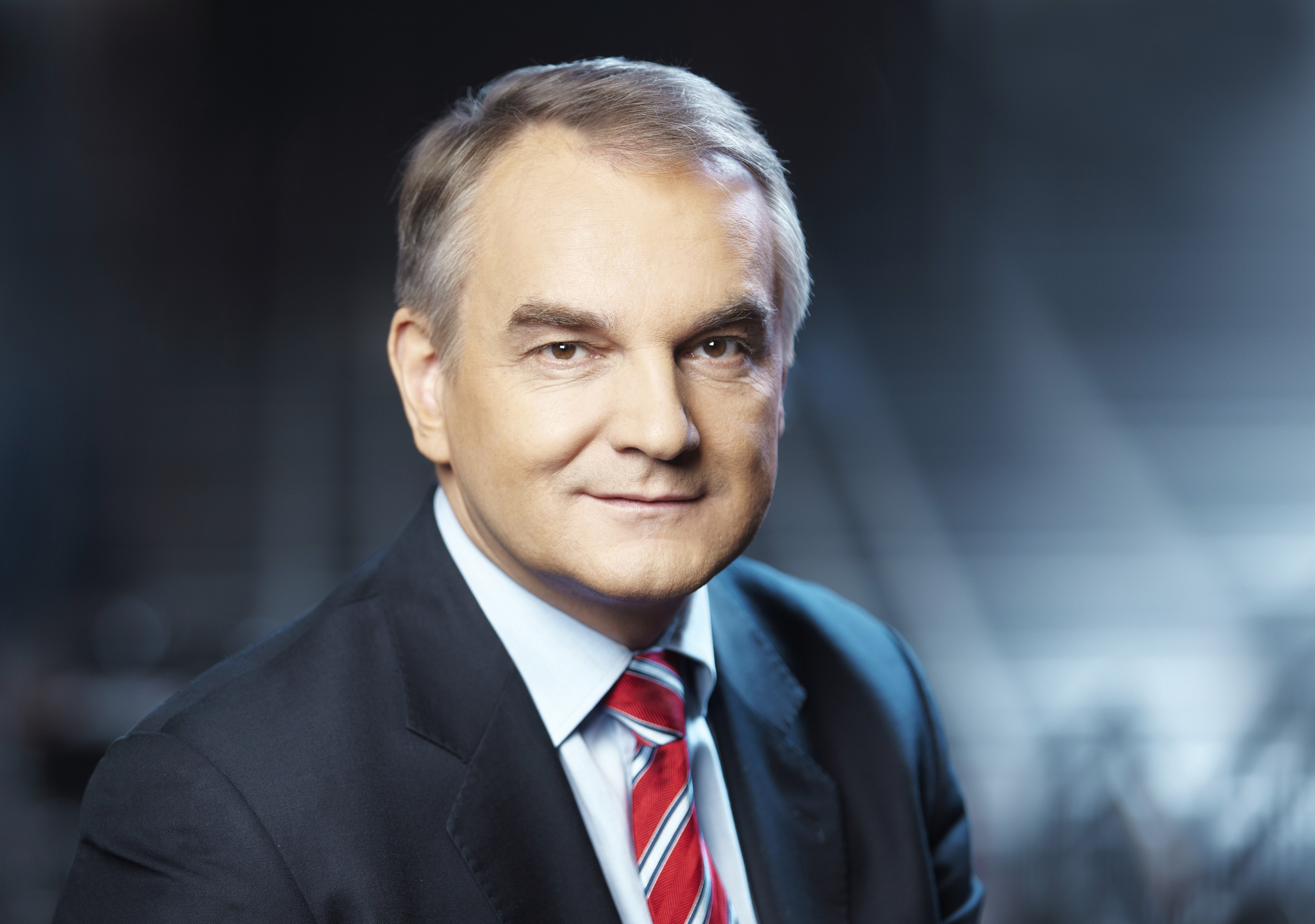 Zdjęcie Waldemara Pawlaka na potrzeby kampanii prezydenckiej 2010